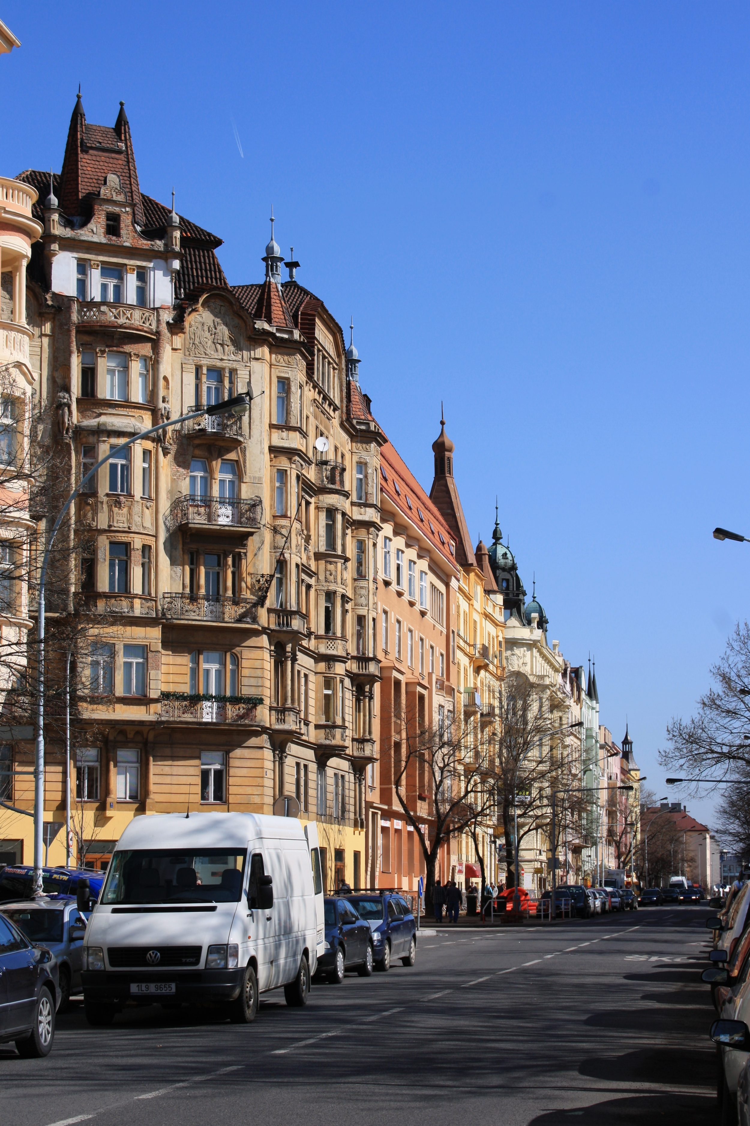 Praha, Vršovice - Kodaňská